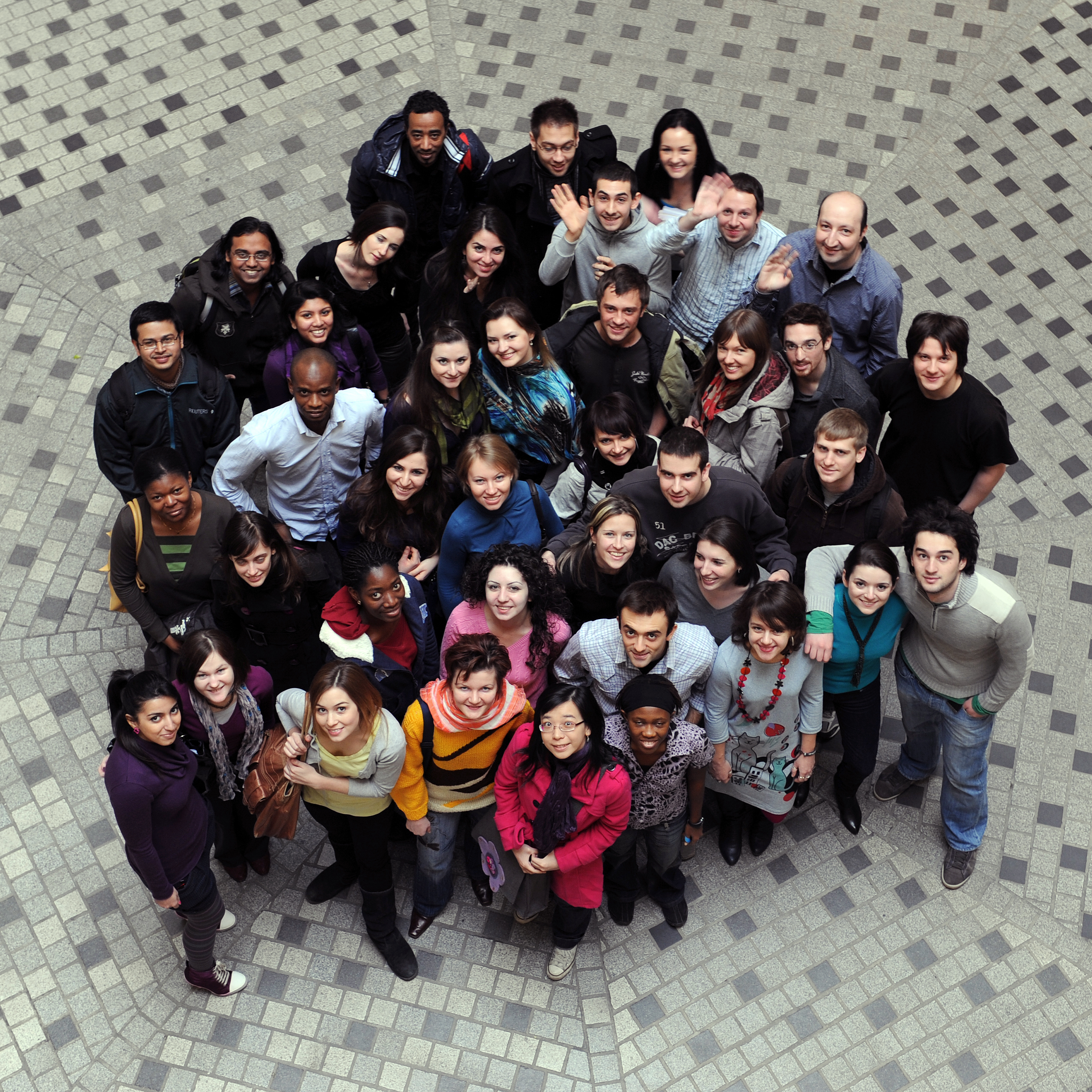 Studenci